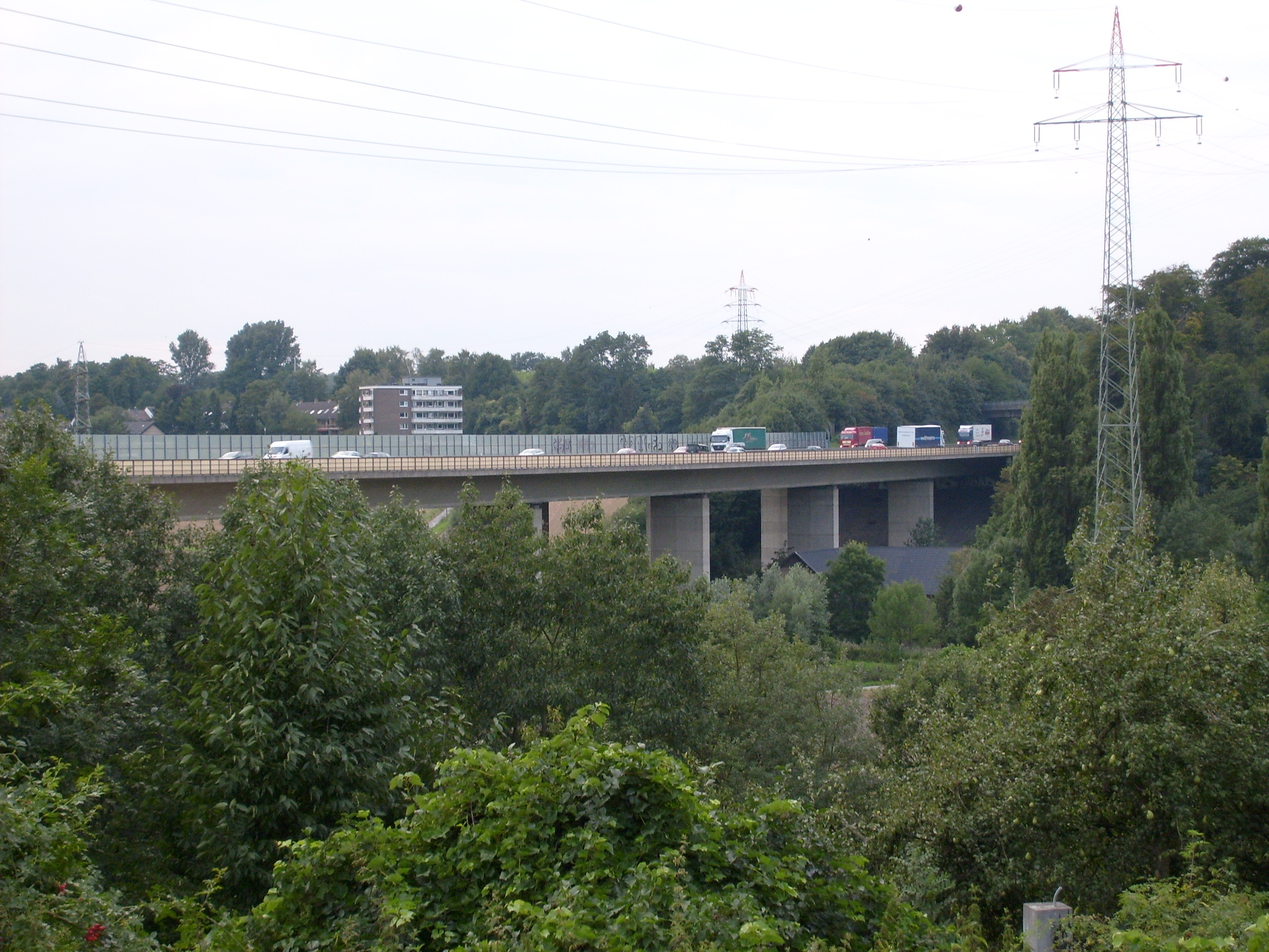 Neandertalbrücke in Erkrath - Autobahn A3 (Ausschnitt)